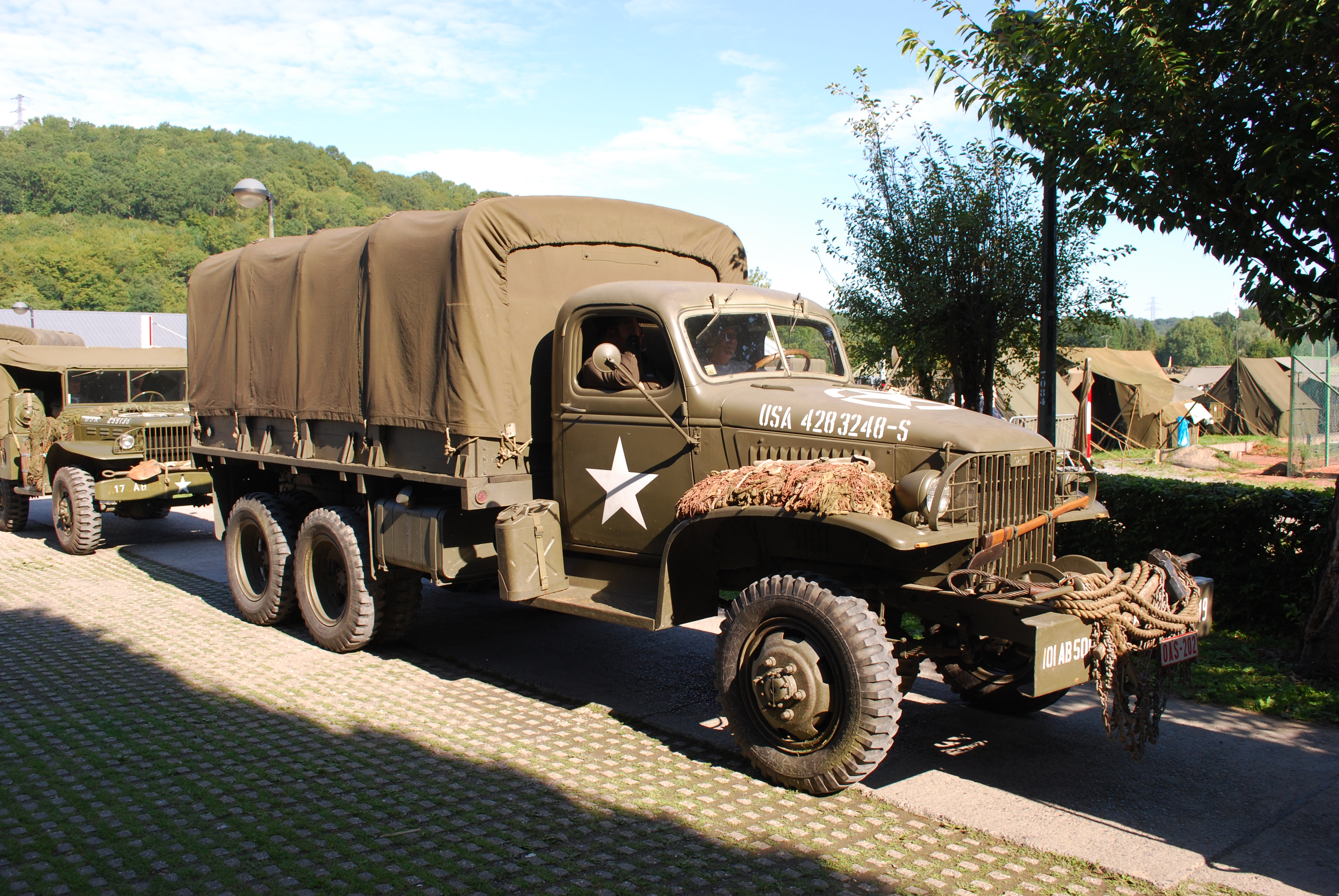 Rassemblement et défilé d'anciens véhicules militaires de l'armée des États-Unis, organisé par l'association "Indian Head", le 14 août 2010, à Barvaux.